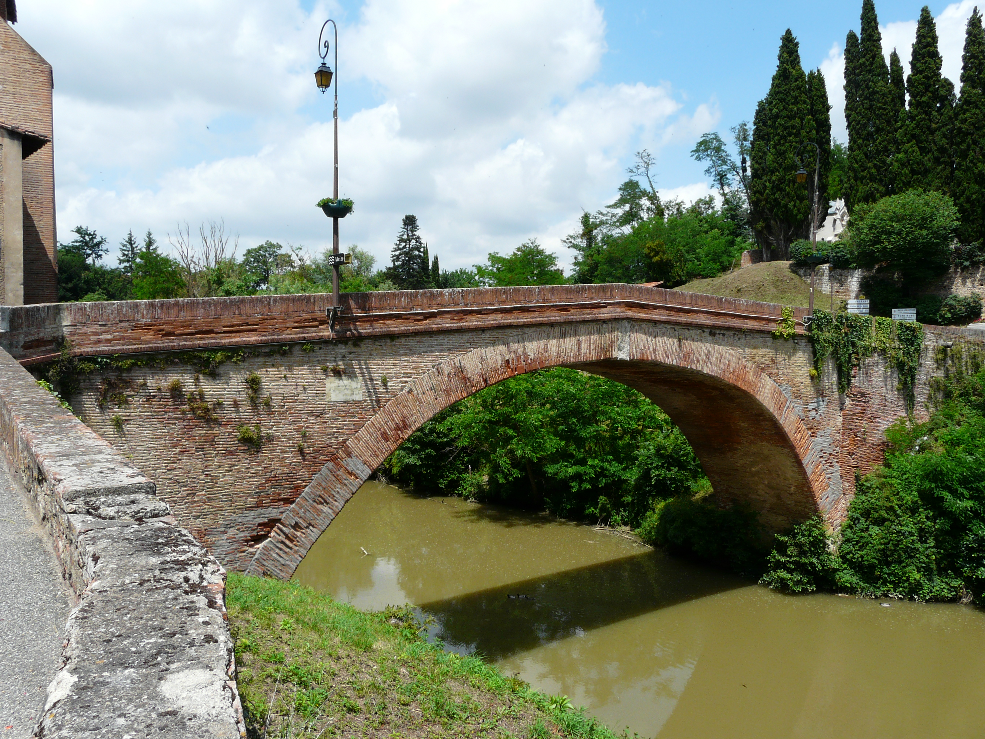 Le pont de Lajous, au-dessus de l'Arize, Rieux-Volvestre, Haute-Garonne, France.